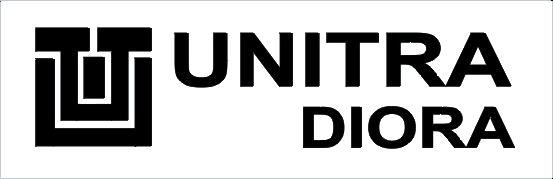 Logo Zakładów Radiowych Unitra-Diora w Dzierżoniowie S.A.